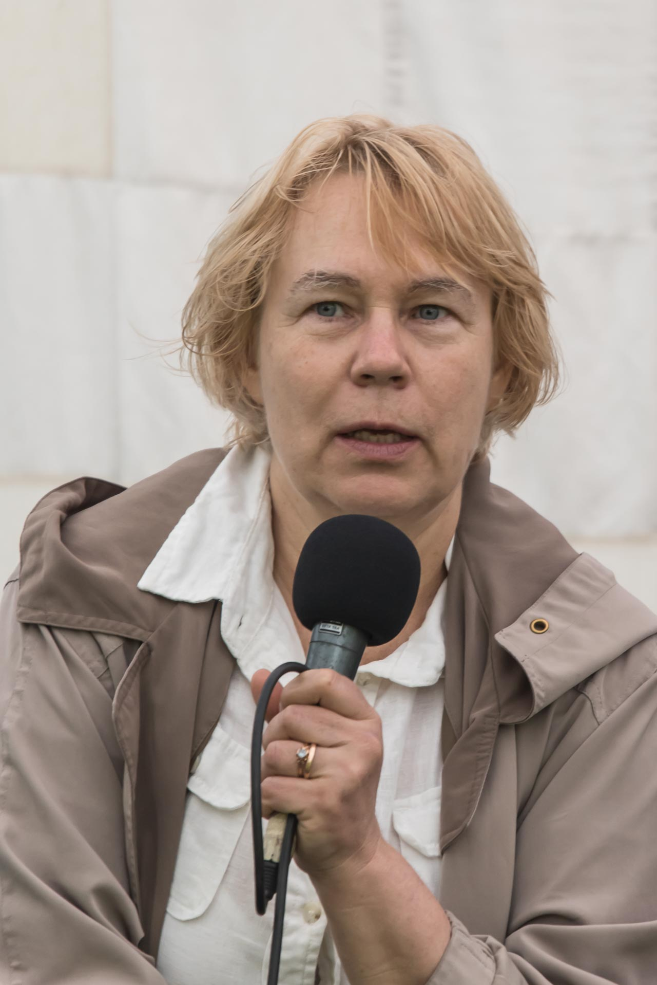 Maarja Lõhmus teisel Arvamusfestivalil Narvas. Arutelu teemaks "Ida­-Viru meediapeeglis – ilus või kole?".